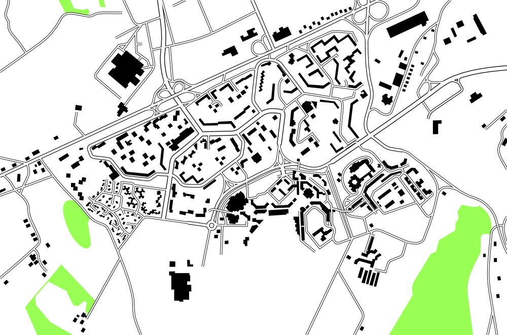 Plan du quartier de Planoise à Besançon réalisé à partir des cadastres de 1989.